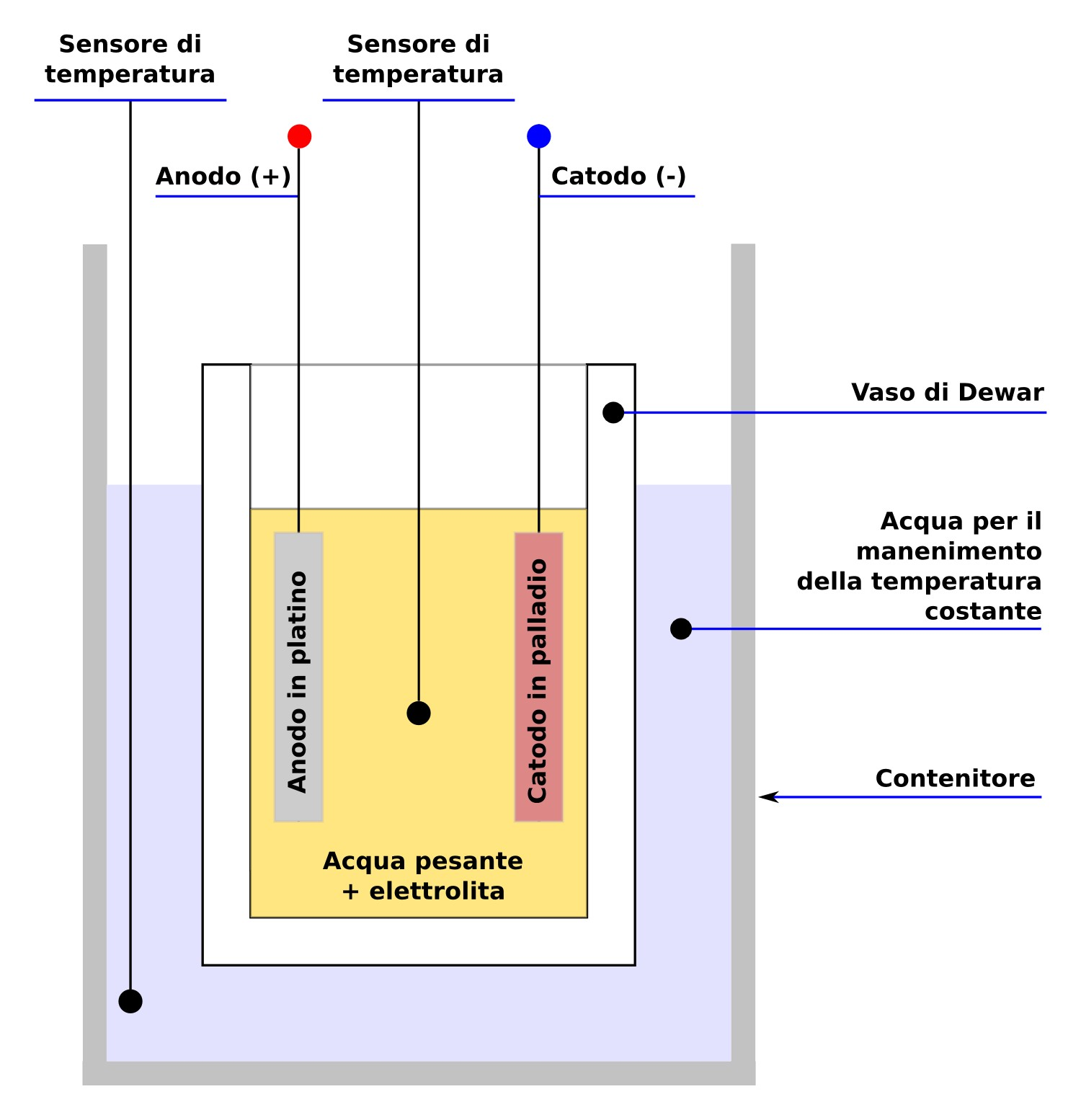 Schema della cella elettrolitica di Fleischmann e Pons del 1989, per le reazioni di fusione fredda platino ed acqua pesante (deuterio)